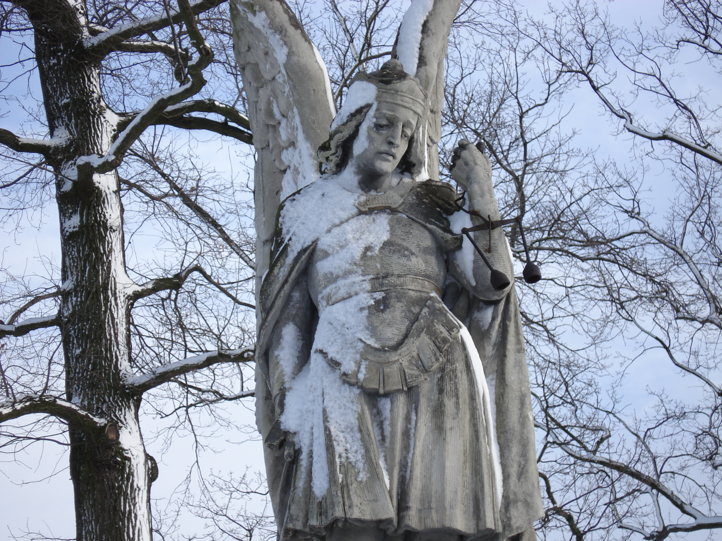 Cmentarz parafialny w Leźnicy Wielkiej (gm. Parzęczew). Rzeźba św. Michała Archanioła